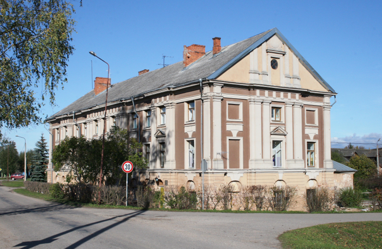 Kroņvircavas muižas "Kavalieru māja"